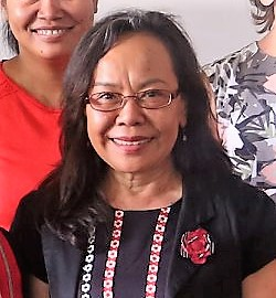 Vicky Tchong, osttimoresische Diplomatin.